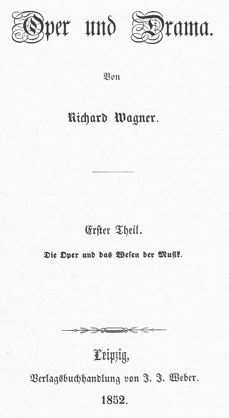 Titel Erstdruck Oper und Drama 1852